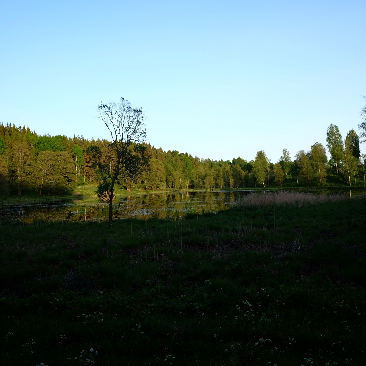 Liten sjö norr om Snavlunda. Eventuellt del av Trehörningen.